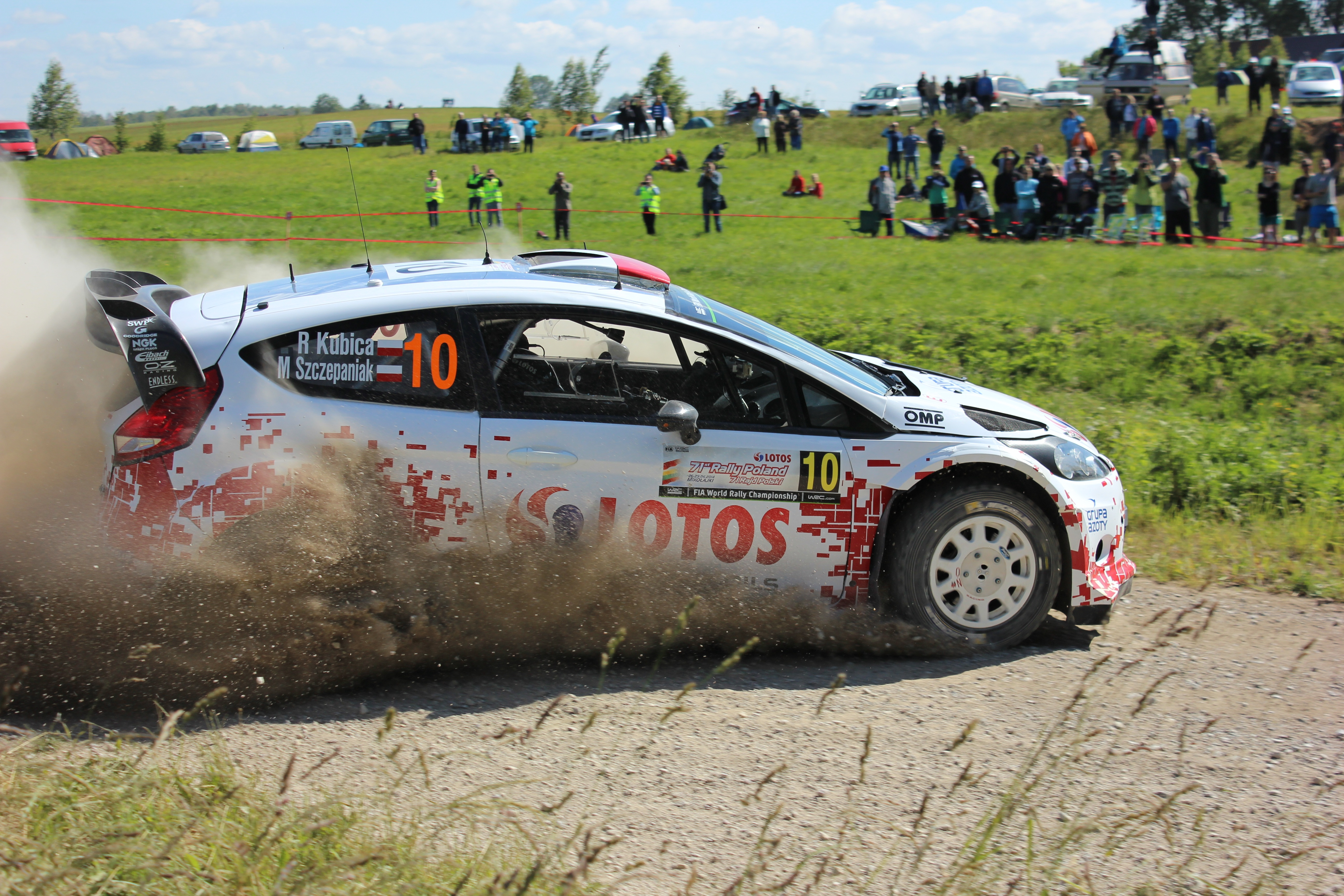 Robet Kubica podczas Rajdu Polski 2014